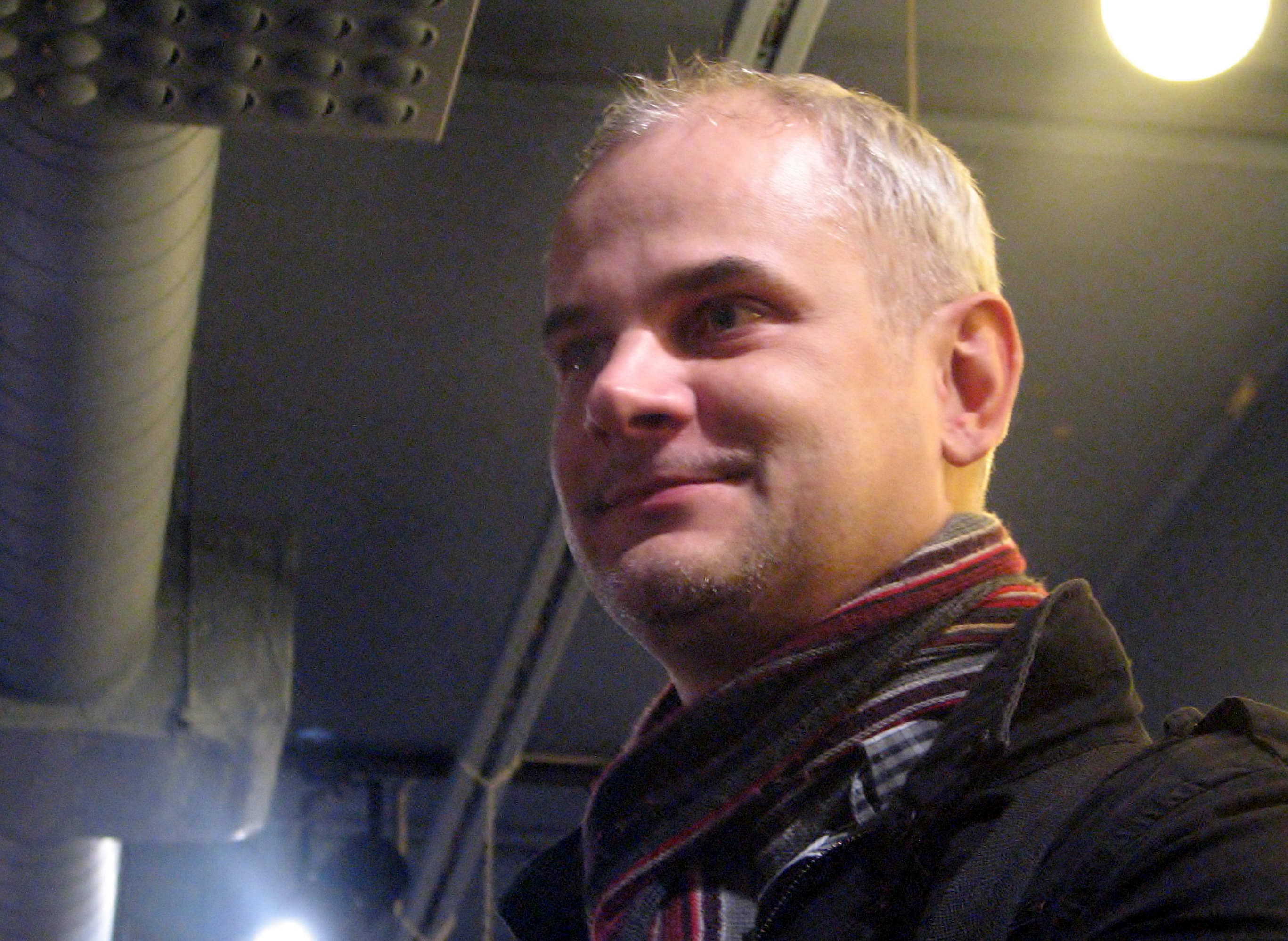 Olaf Suuder Merilin Piirsalu raamatu "Petlik õnn" esitlusel Viru Keskuse Rahva raamatus